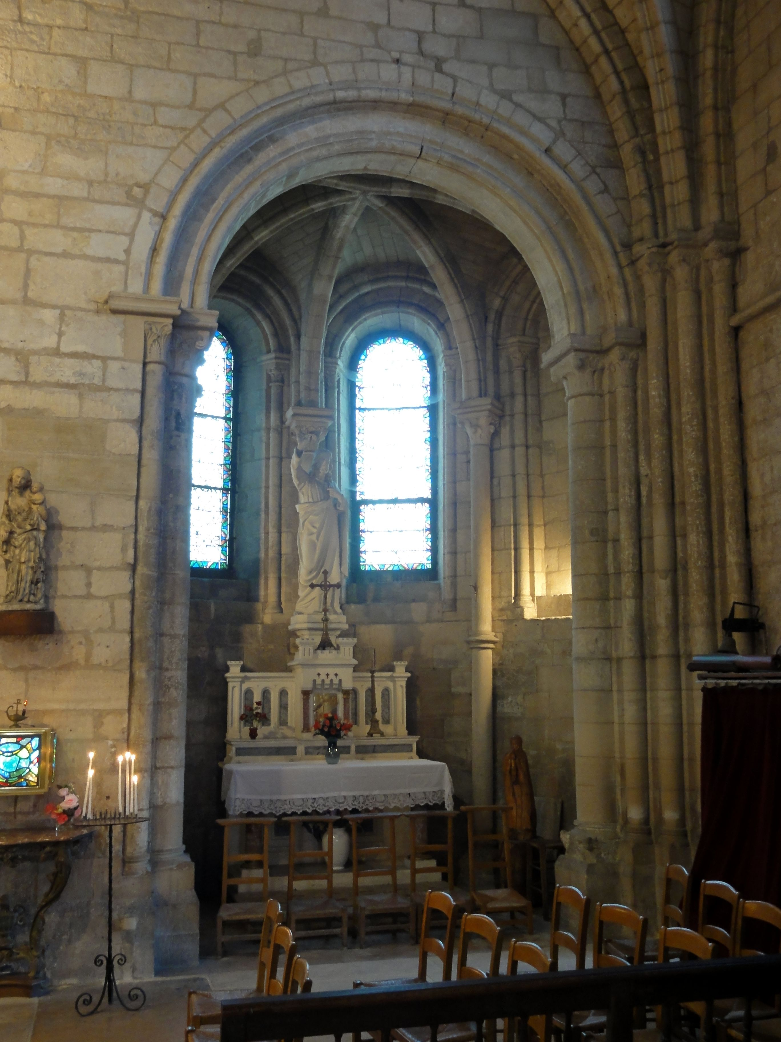 Absidiole sud : chapelle de la Vierge.